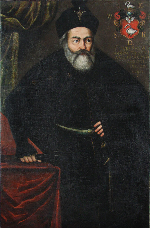 Беларуская (тарашкевіца): Партрэт Якуба Кунцэвіча (Jakub Kuncevič)